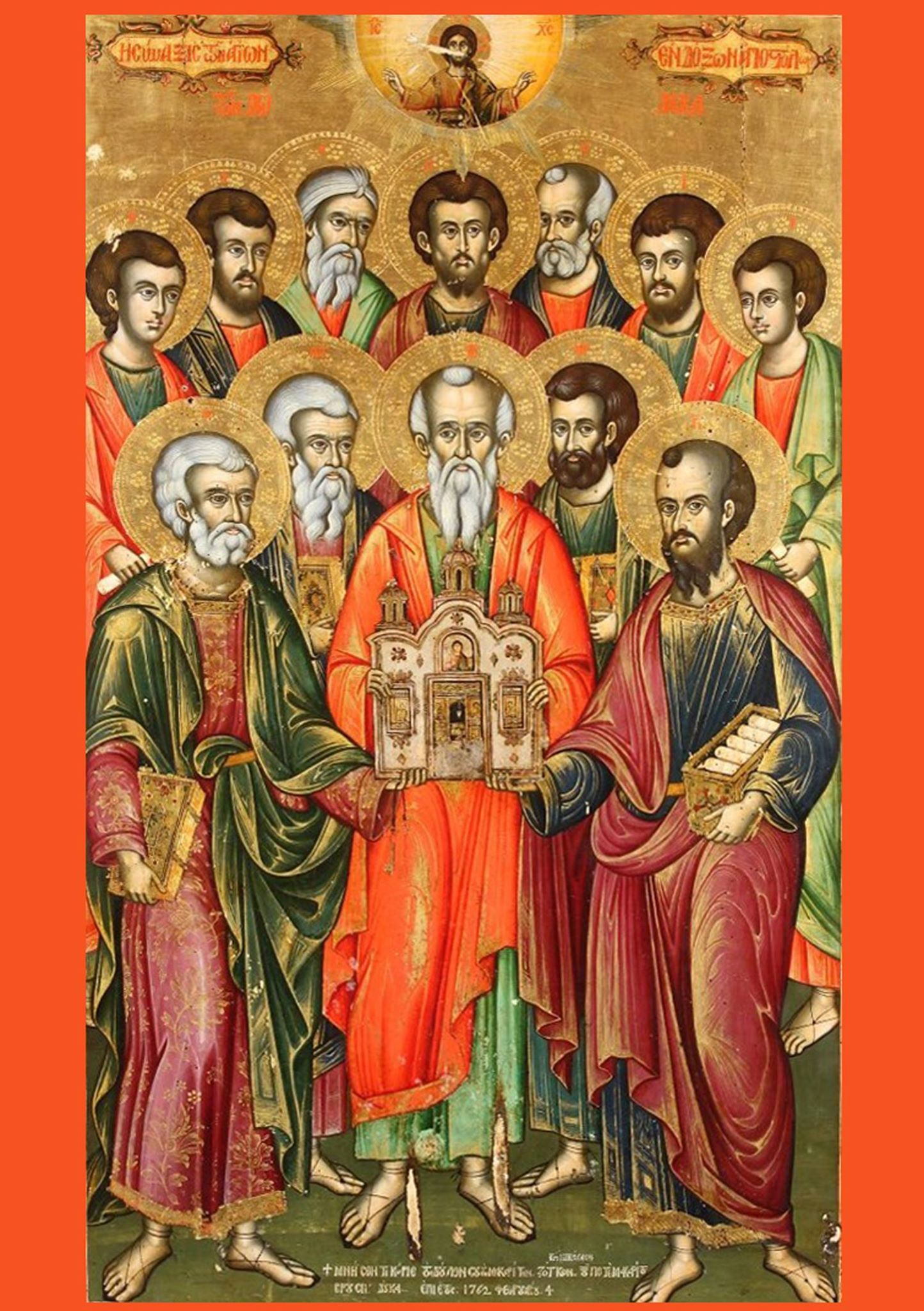 Ikonë e të Dymbëdhjetë Apostujve nga Shqipëria